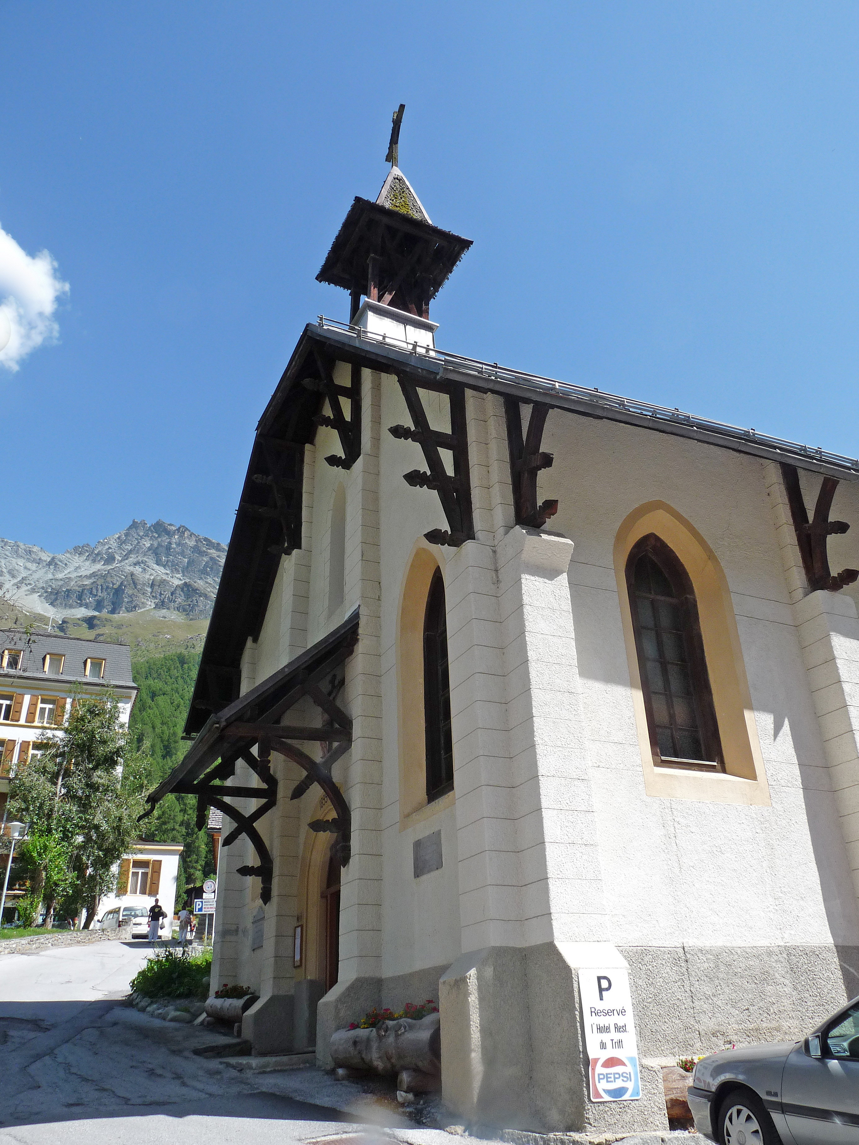 Eglise de Zinal (Valais, Suisse)